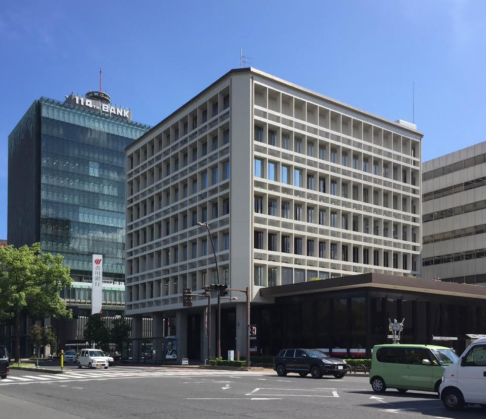 香川銀行の本店